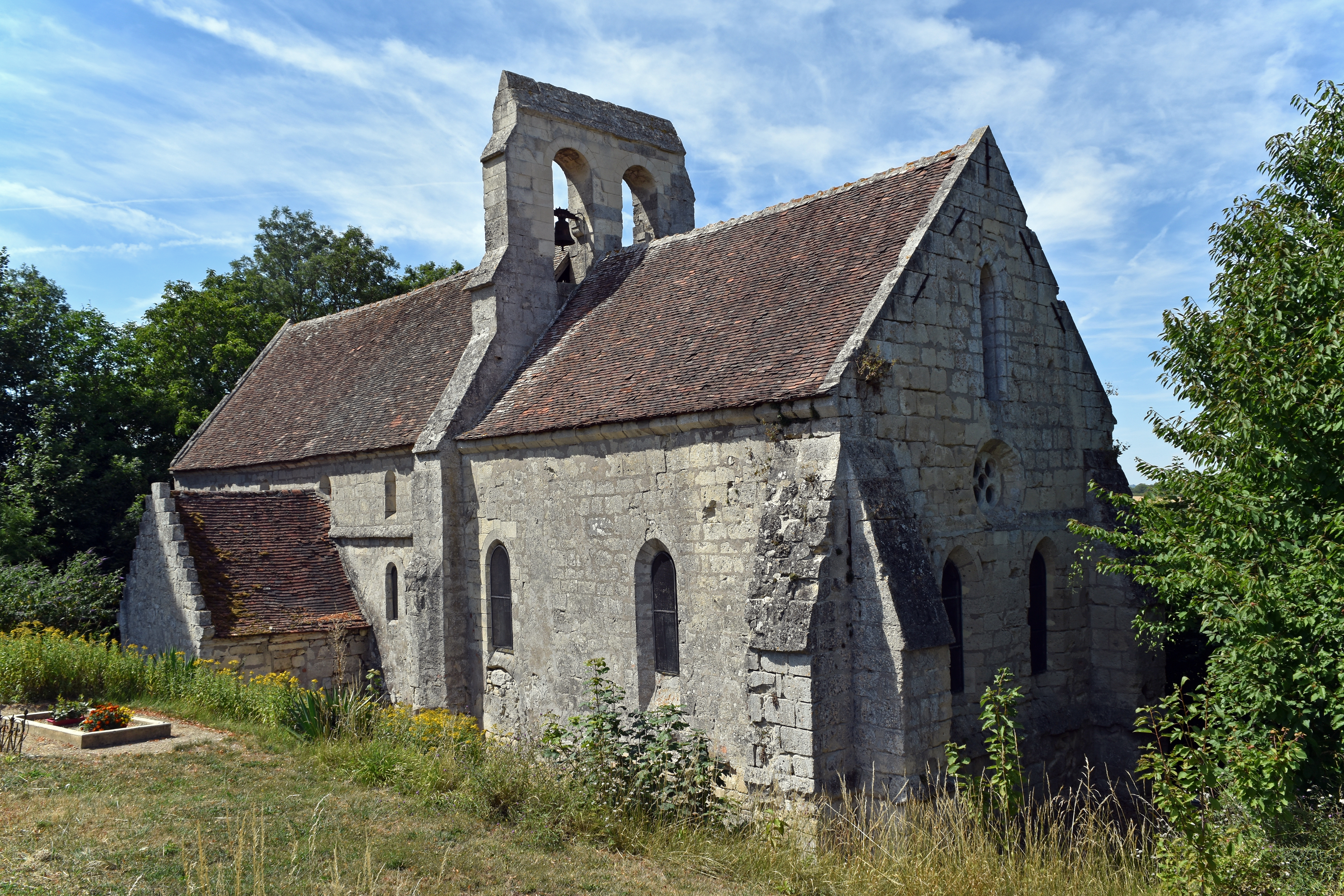 Eglise de Barbonval, Aisne France